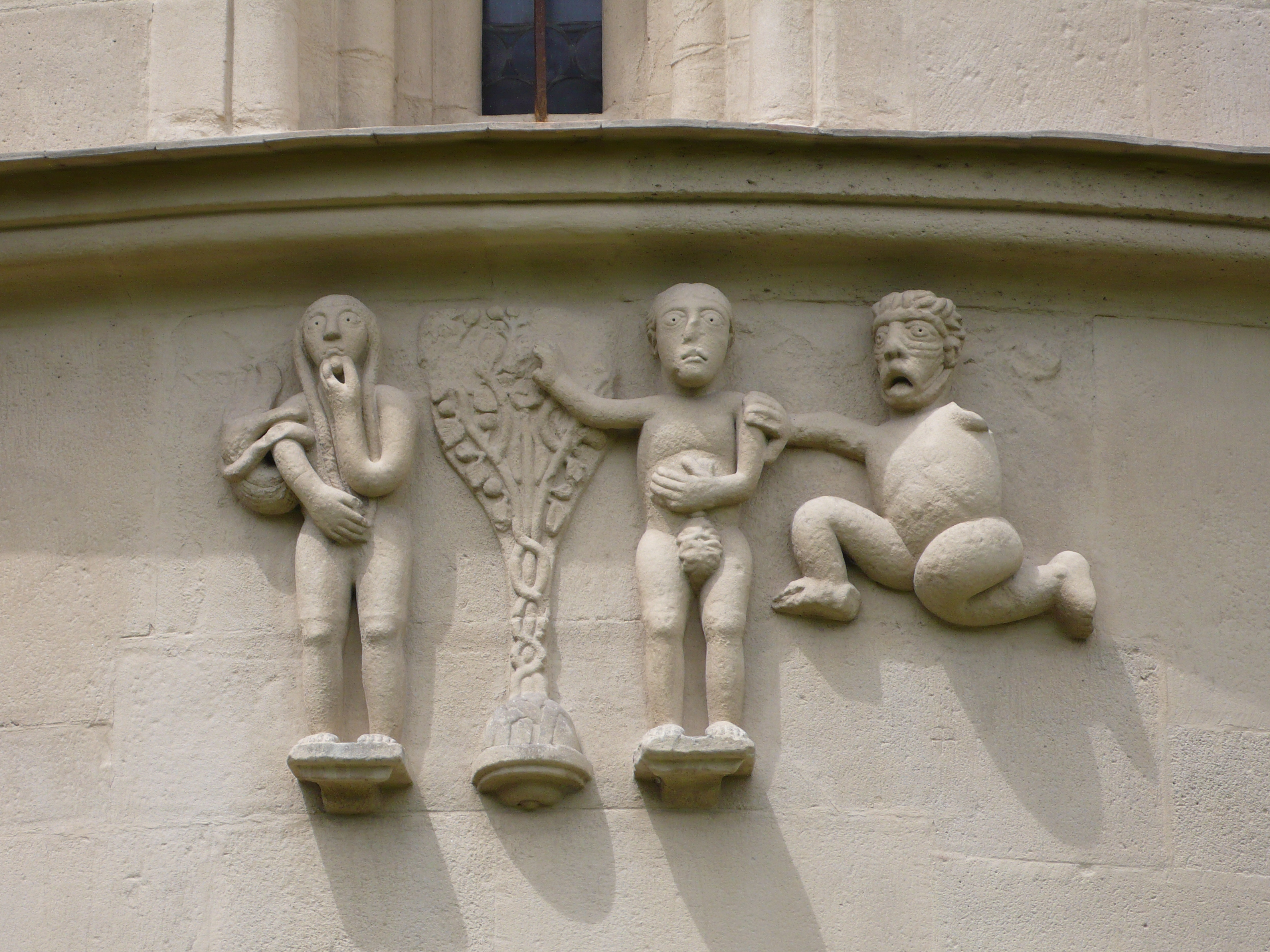 Schöngrabern, Niederösterreich, spätromanische Pfarrkirche, Apsis, Reliefdarstellungen